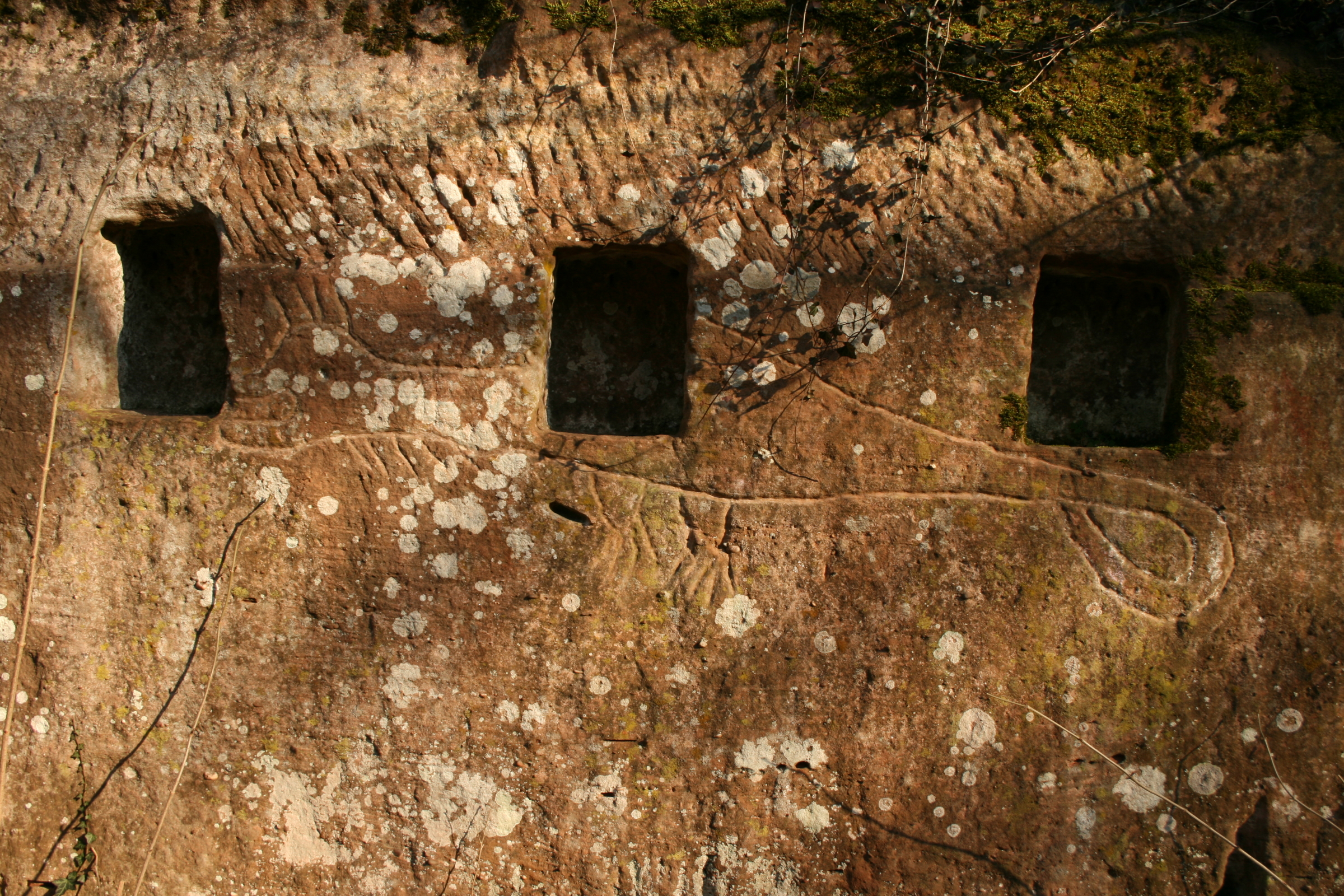 Burg Drachenfels bei Busenberg , Wasgau, Pfälzer Wald. Eingeritzter Drachen im ehemaligen Burgsaal.